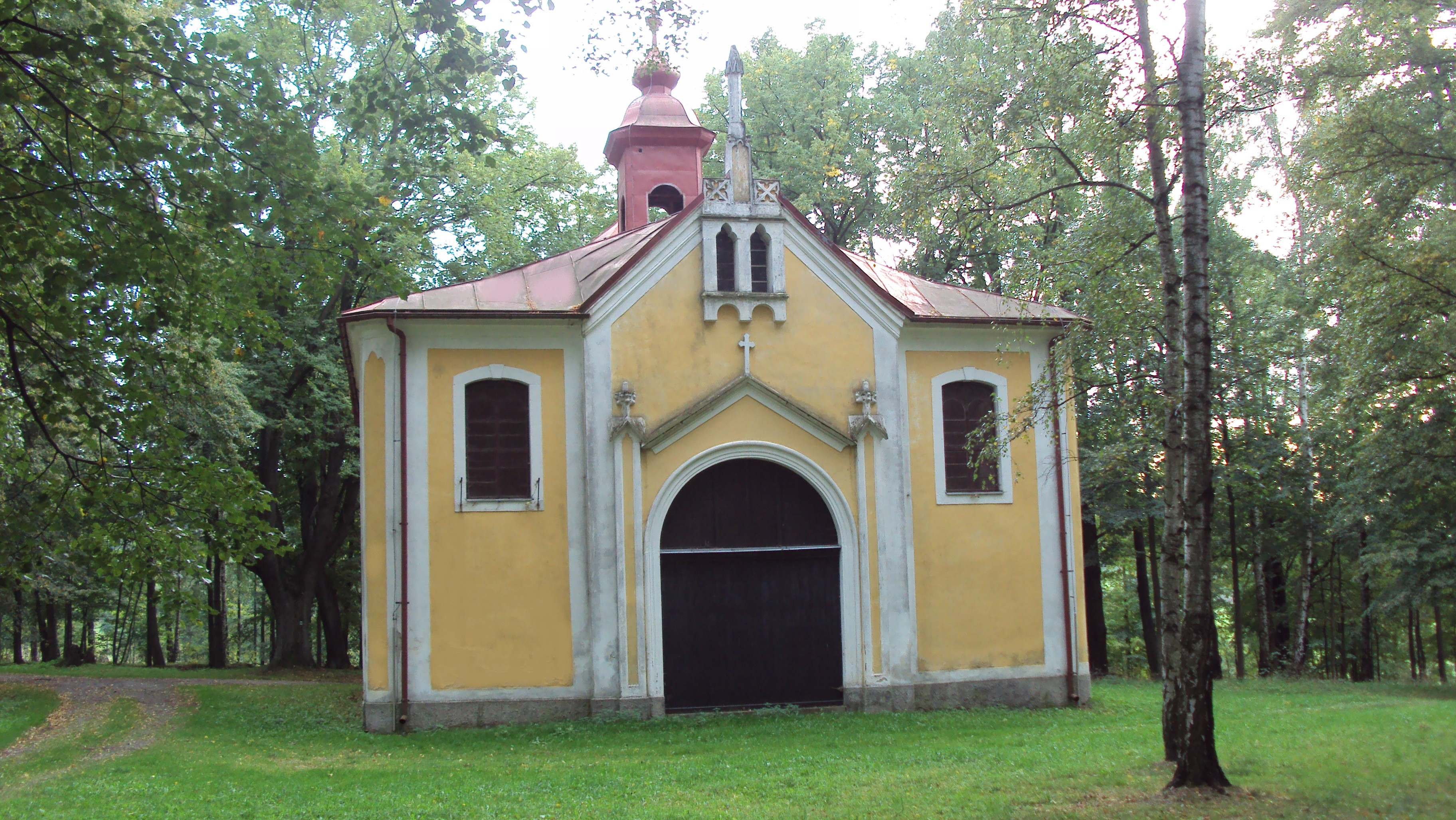 Kaple sv. Anny (Lobendava), Lobendava